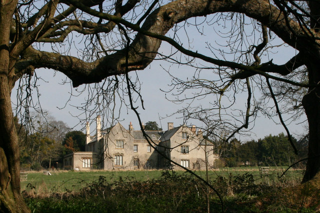 Poundisford Lodge, Pitminster